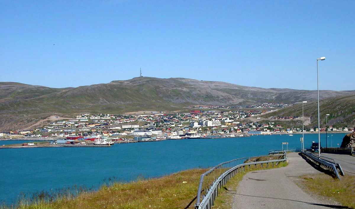 Hammerfest Norwegen